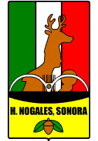 Escudo de la ciudad de Nogales Sonora México